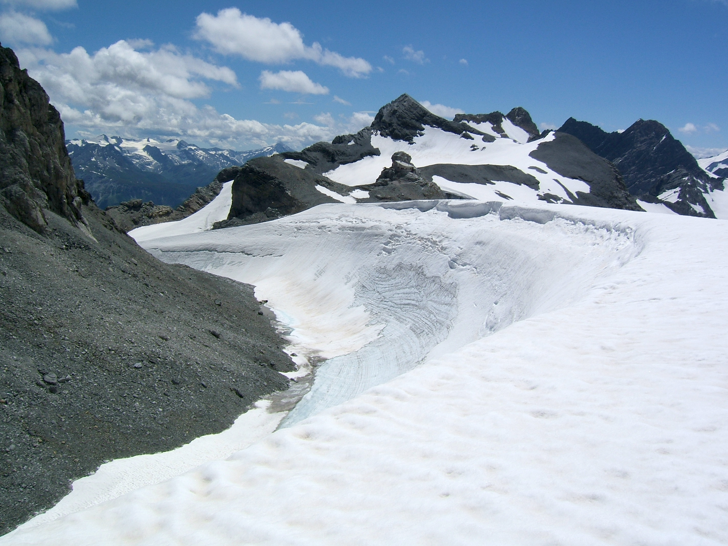 Windkolk bei der Planurahütte (Schweiz)